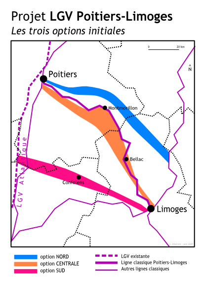 Carte des tracés initiaux du projet de LGV Poitiers-Limoges (2006-2007)